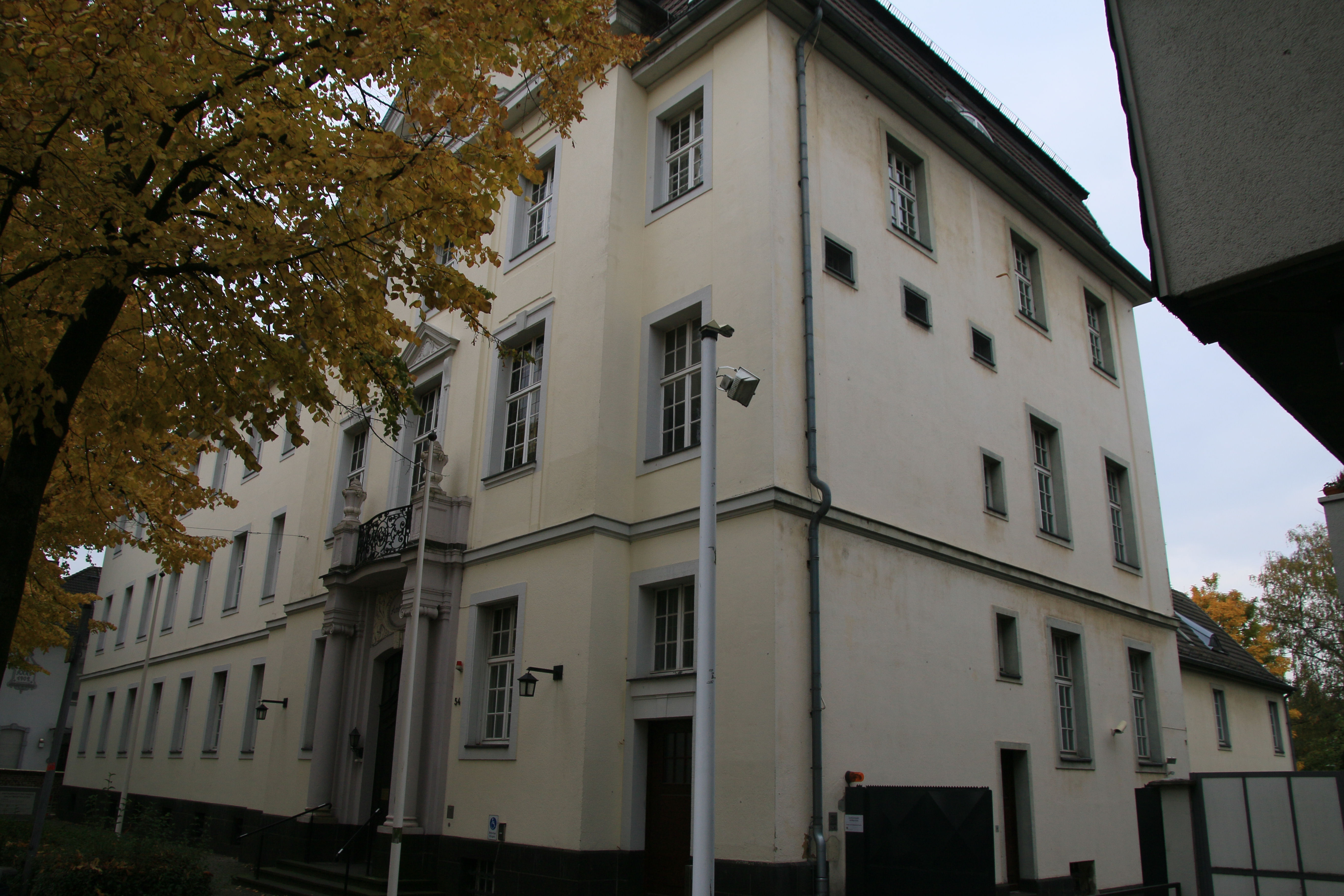 Amtsgericht Ratinge